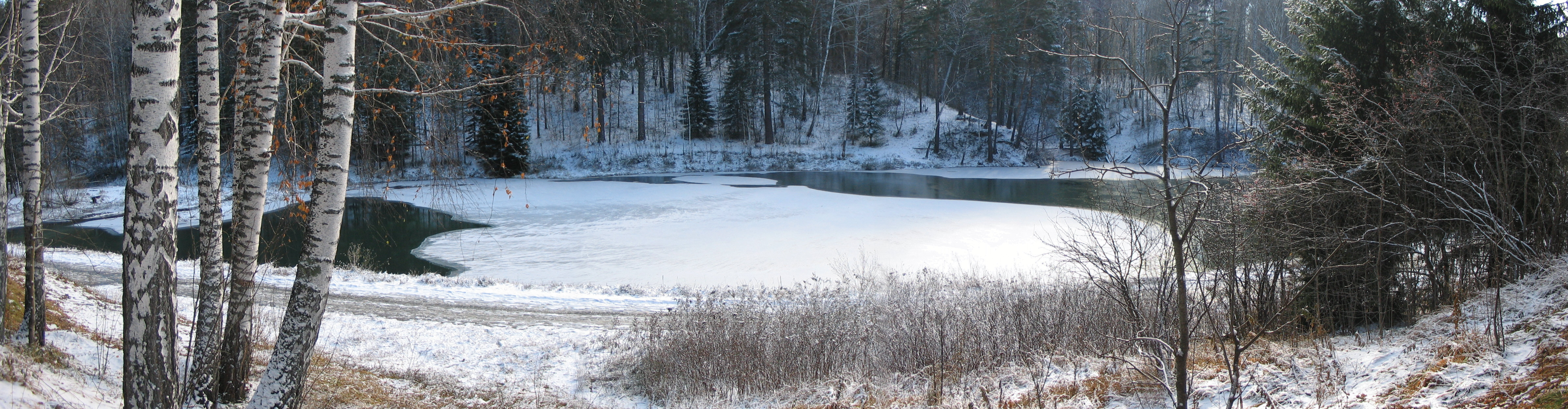 Панорама пруда в ЦСБС